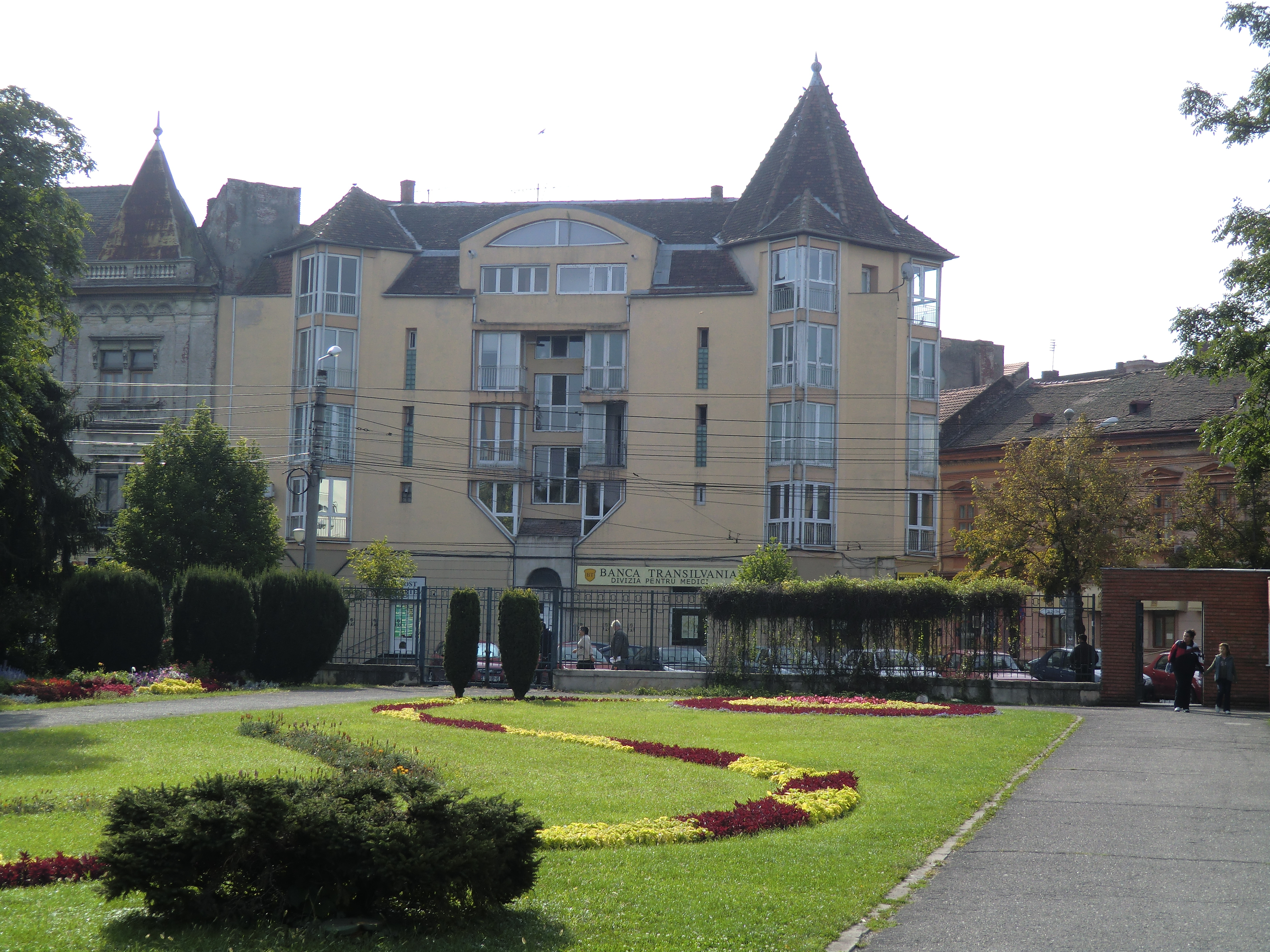 Eingangsbereich Botanischer Garten von Timisoara